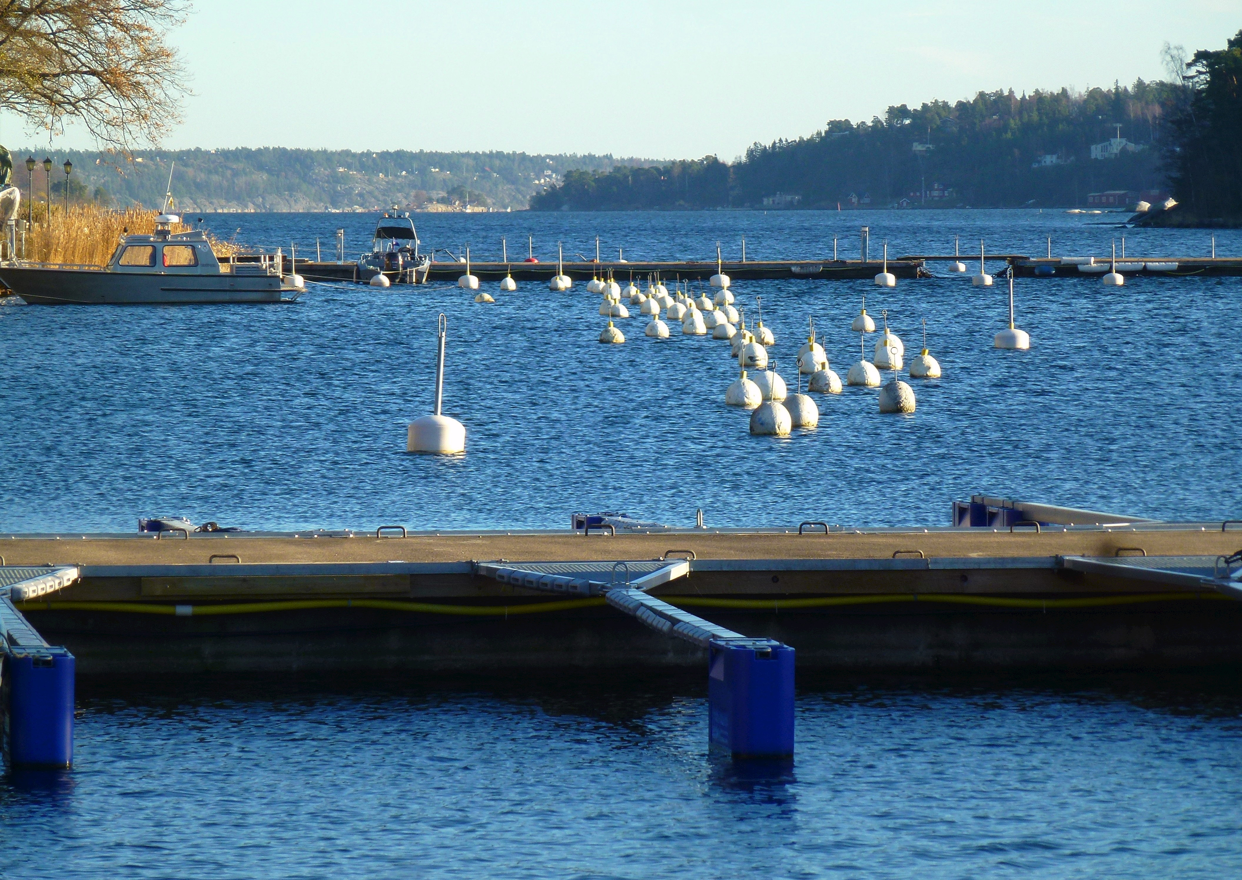 Pålnäsvikens brygga